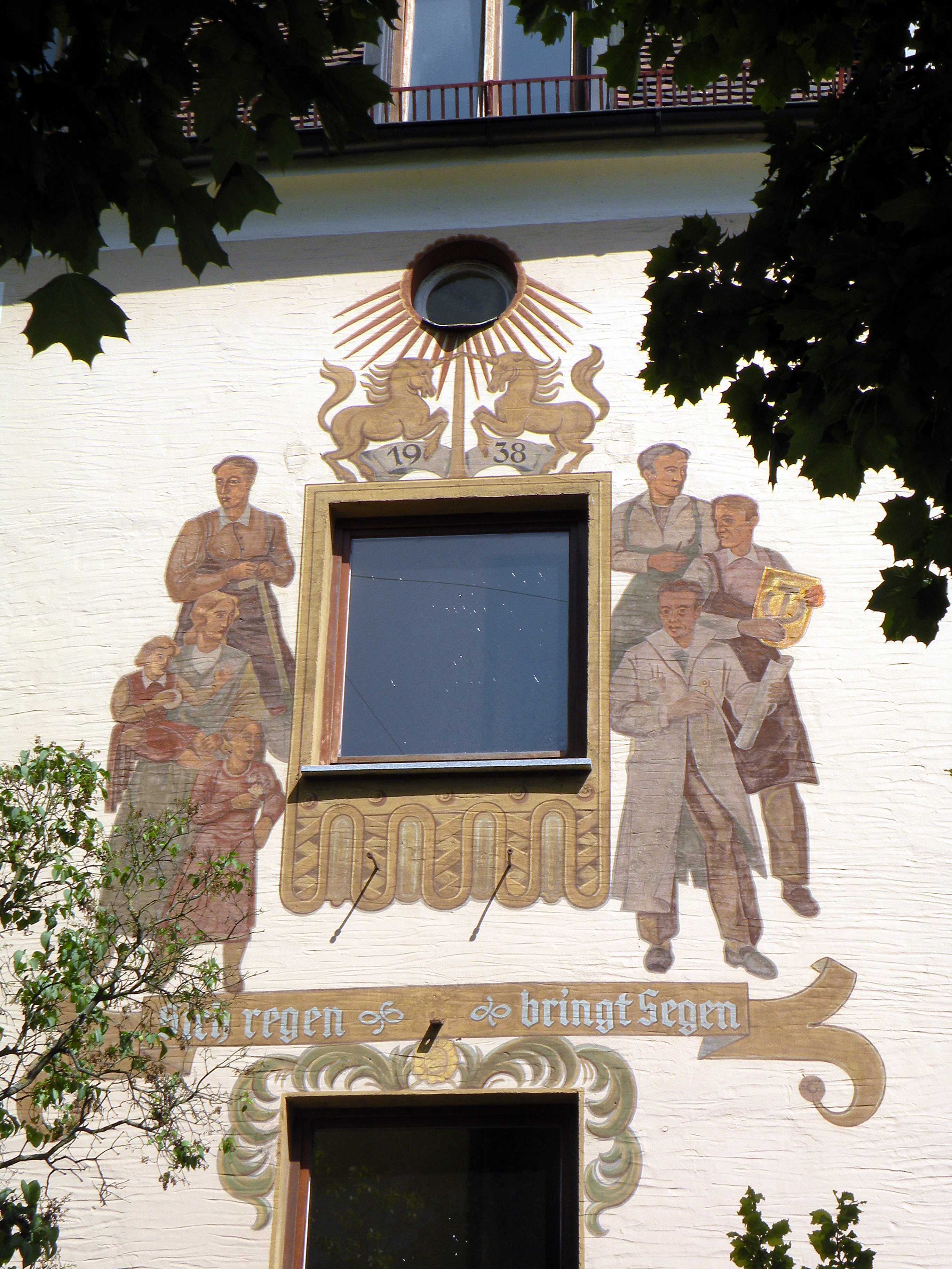 Наглядная пропаганда в Германии.1938 год. Настенная фреска на доме, стоящем на углу улицы Бисмарка и Аузере Зульцбахер Штрассе.